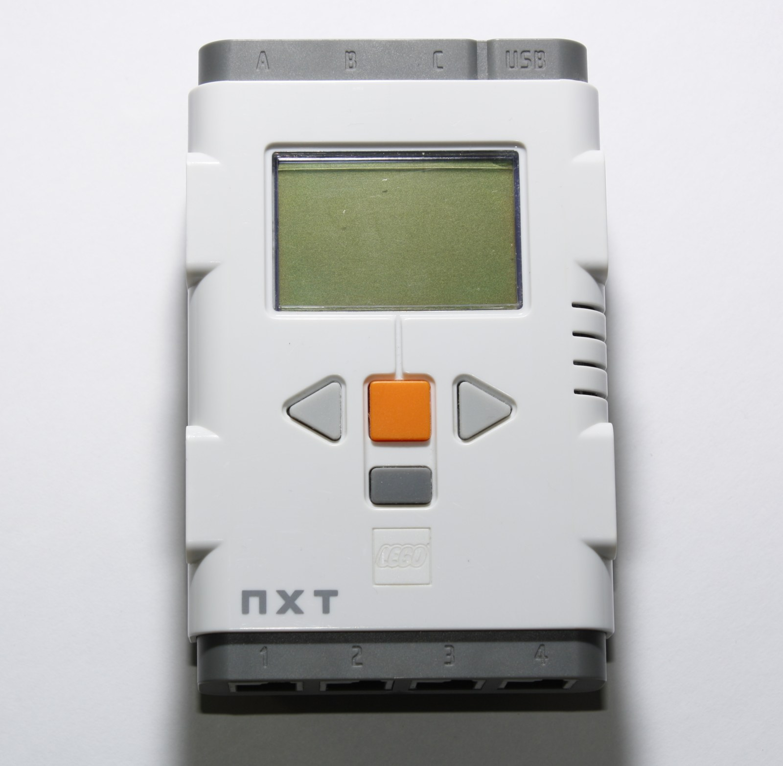 Lego Spybot Hauptbaustein